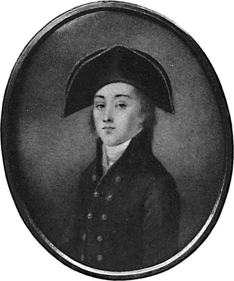 Князь Никита Григорьевич Волконский (1781-1844)